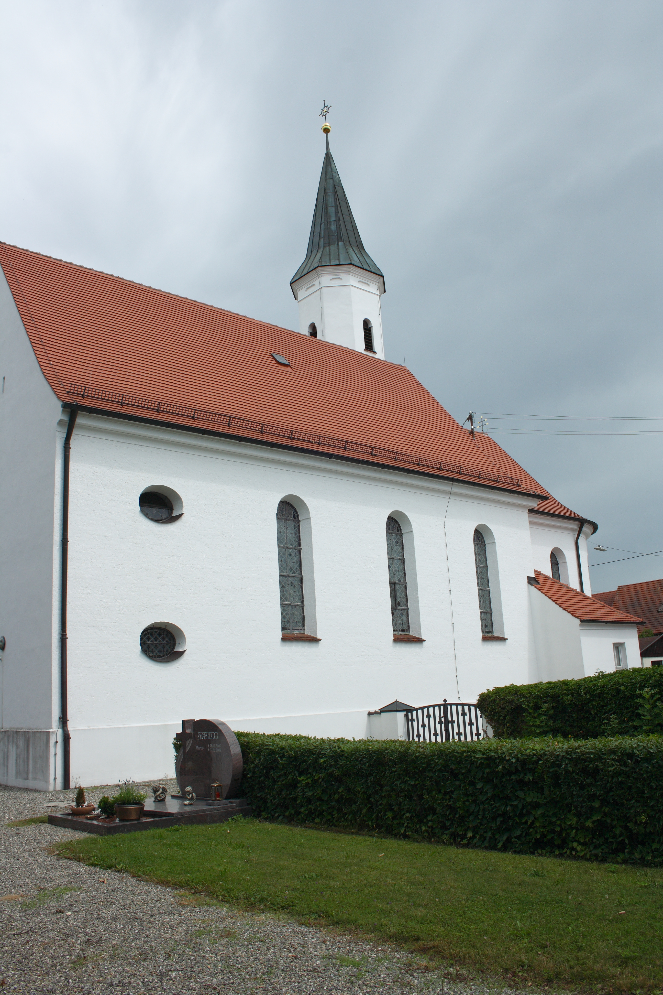 Katholische Pfarrkirche Hl. Kreuz in Landensberg